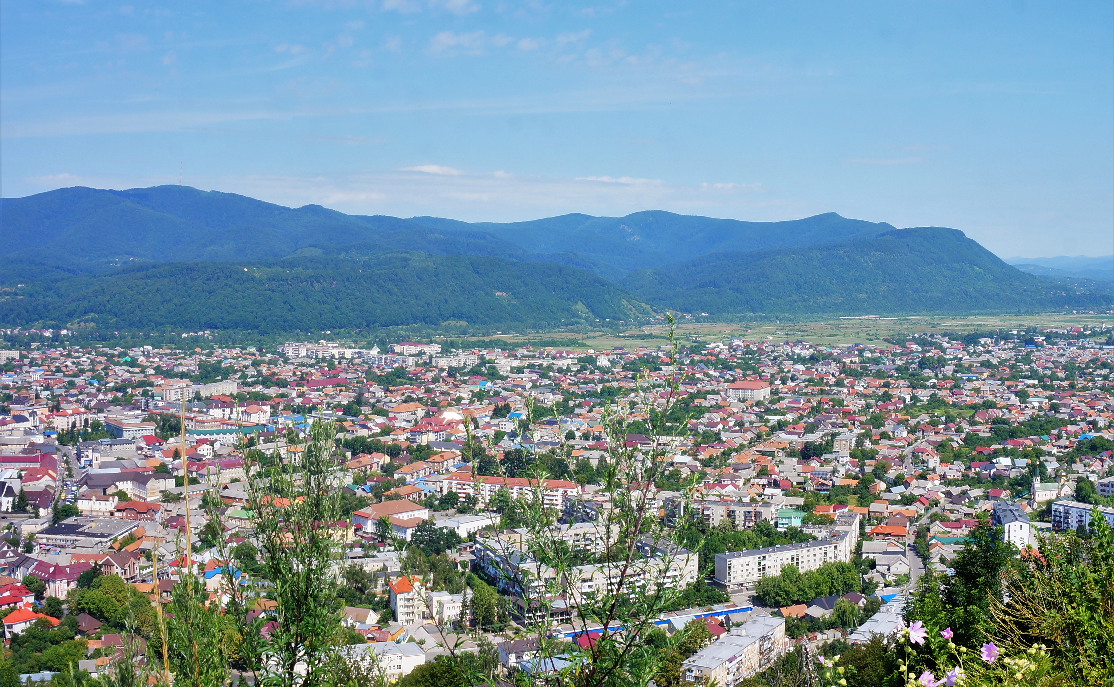 Комплекс 2-поверхової забудови, Хуст, вул. Пушкіна, Карпатської України, Лермонтова, Шевченка